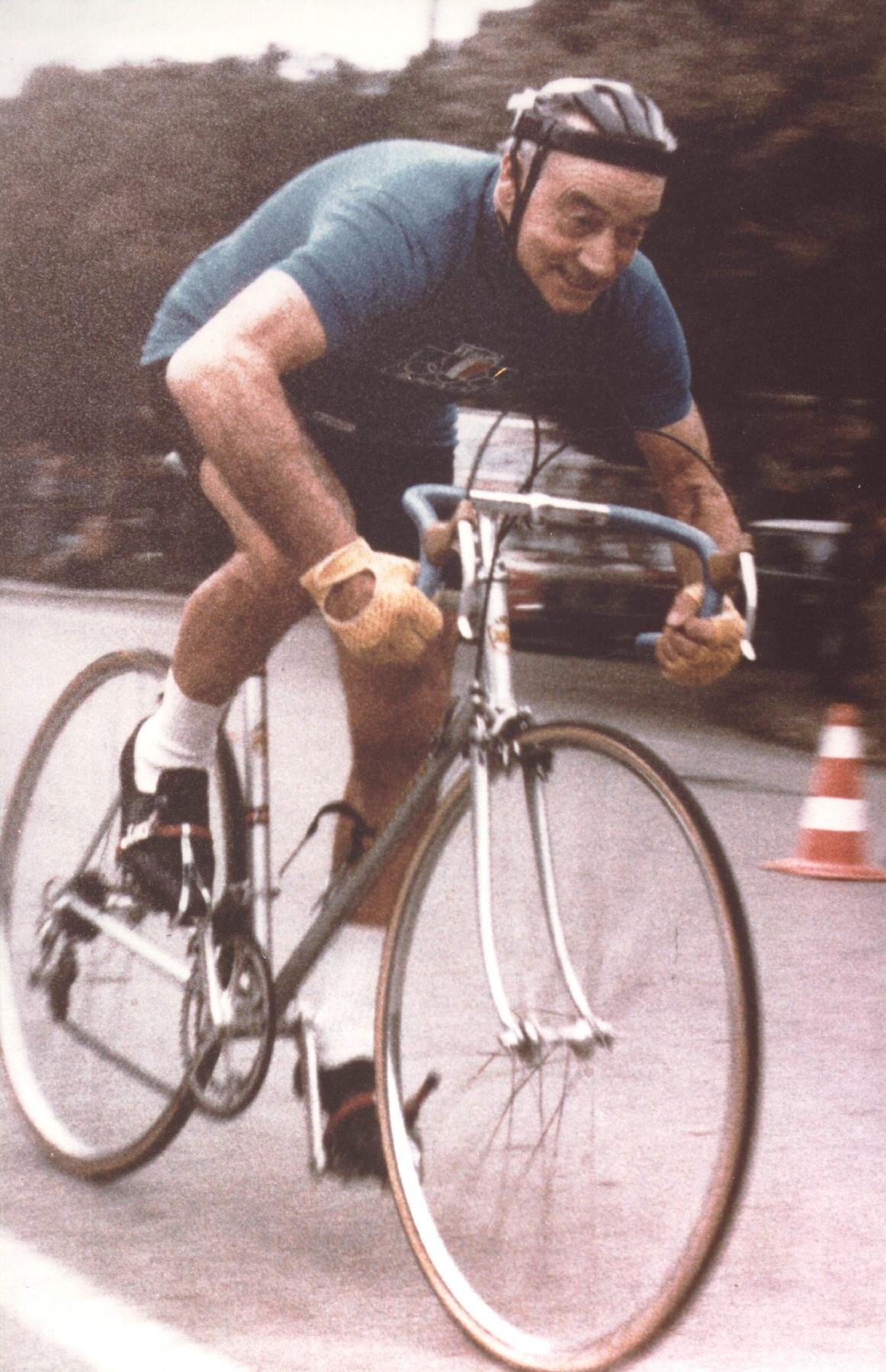 Ambrogio Morelli, Atleta Azzurro, affronta da ottantenne con grinta l'arrivo di una Gara per vecchie Glorie a Loano